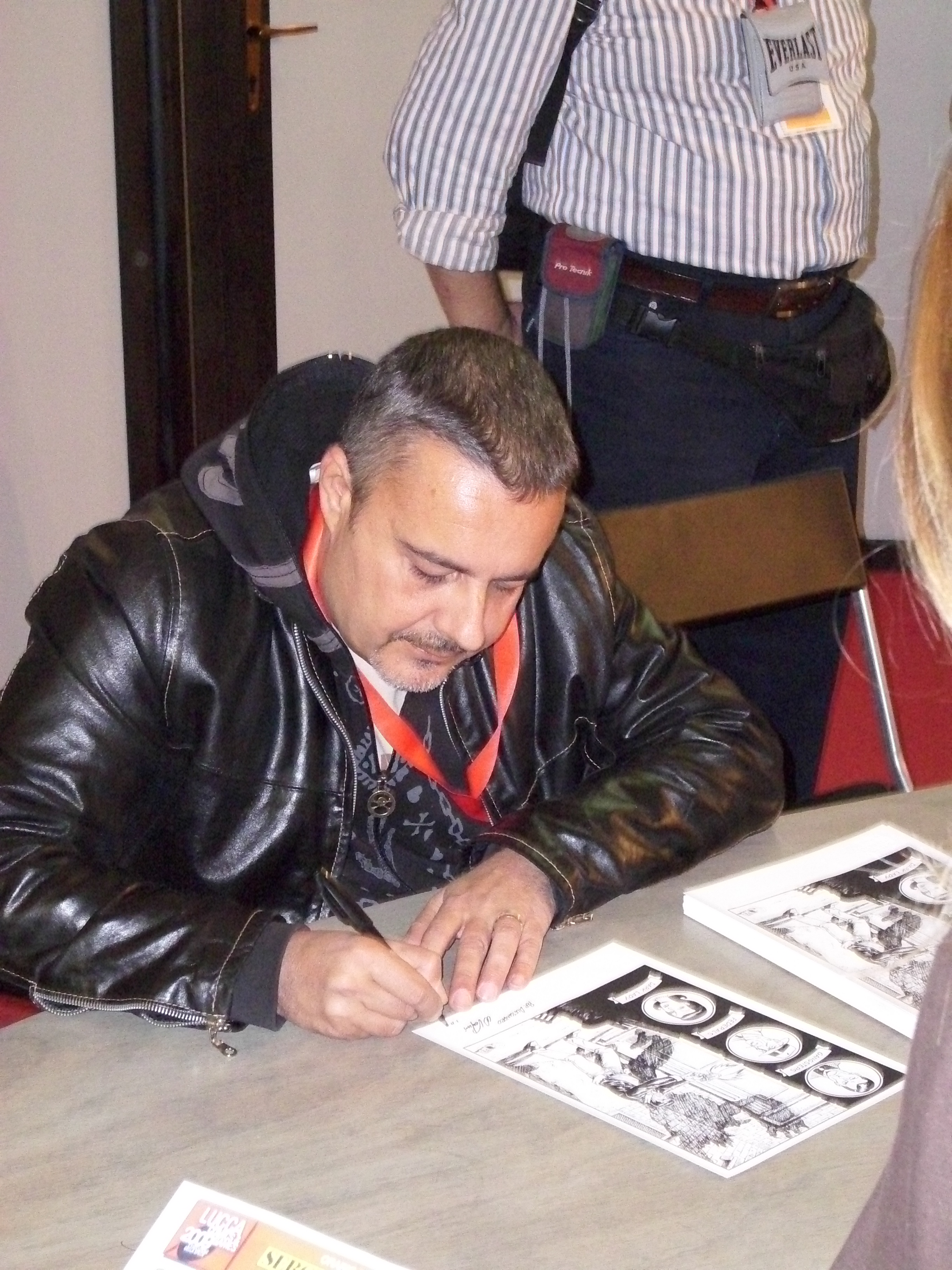 Il disegnatore Walter Venturi autografa disegni allo stand della Sergio Bonelli editore a Lucca Comics 2009.